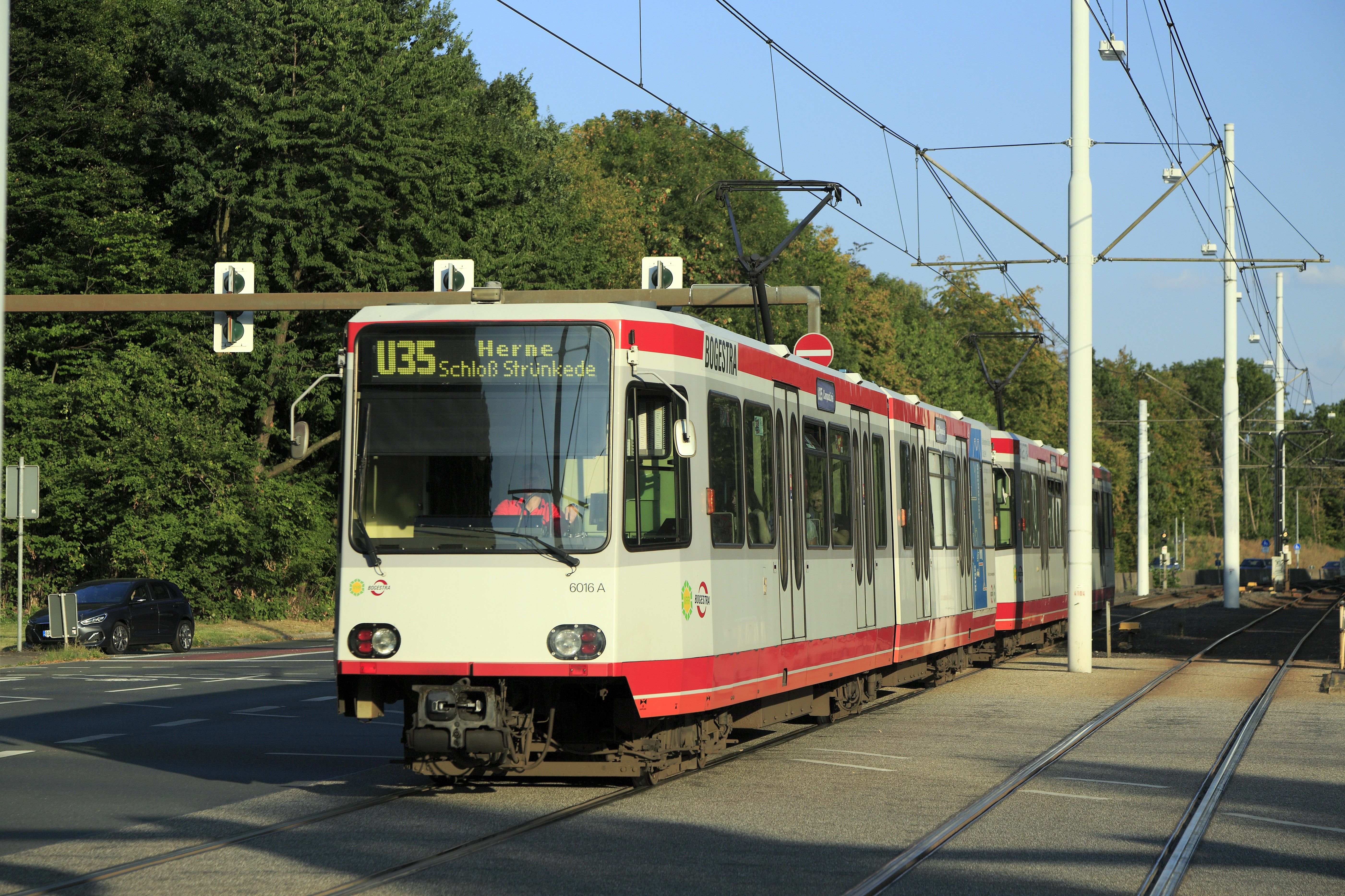 Stadtbahnwagen B in Doppeltraktion Richtung Herne auf dem Wegübergang. Weil dieser und ein weiterer an der Brenscheder Straße nur durch eine Straßen-Lichtsignalanlage, jedoch nicht mit Warnkreuzen und gesonderten Straßensignalen mit BÜSTRA-Abhängigkeit gesichert ist, gilt der Betrieb als am Straßenverkehr teilnehmend. Nur deshalb müssen die Wagen mit Blink- und Bremslichtern ausgerüstet sein. Wirklich benötigt werden sie hier nicht.Die Strecke der Linie U35 ist durchgehend mit hohen Bahnsteigen ausgerüstet, die Wagen benötigen keine Klapptrittstufen. Die seitlichen Anzeigen sind, da es nur eine Regelspurlinie gibt, mit festen Scheiben und der hinterleuchteten Beschriftung »U35« versehen.